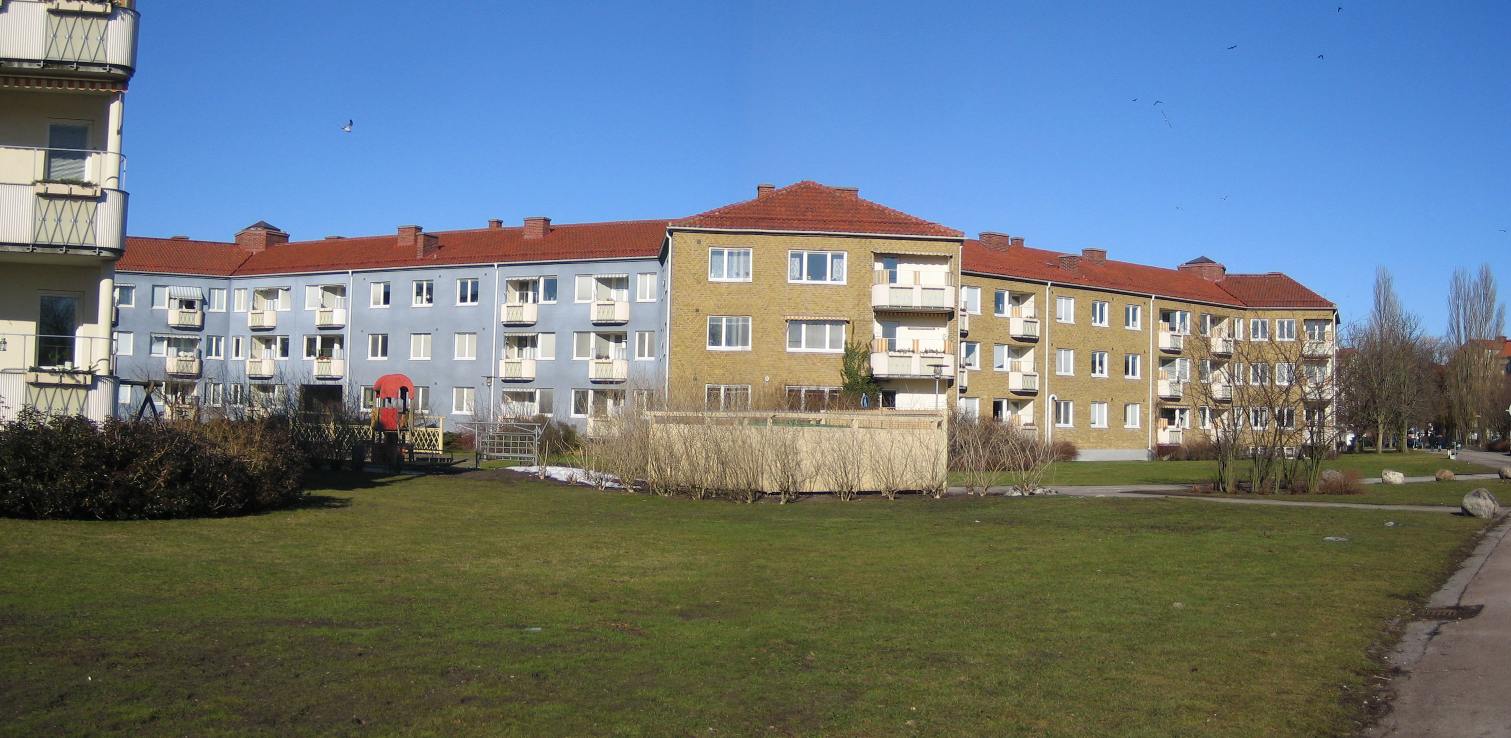 Panorama picture of Stjärnhusen, Malmö